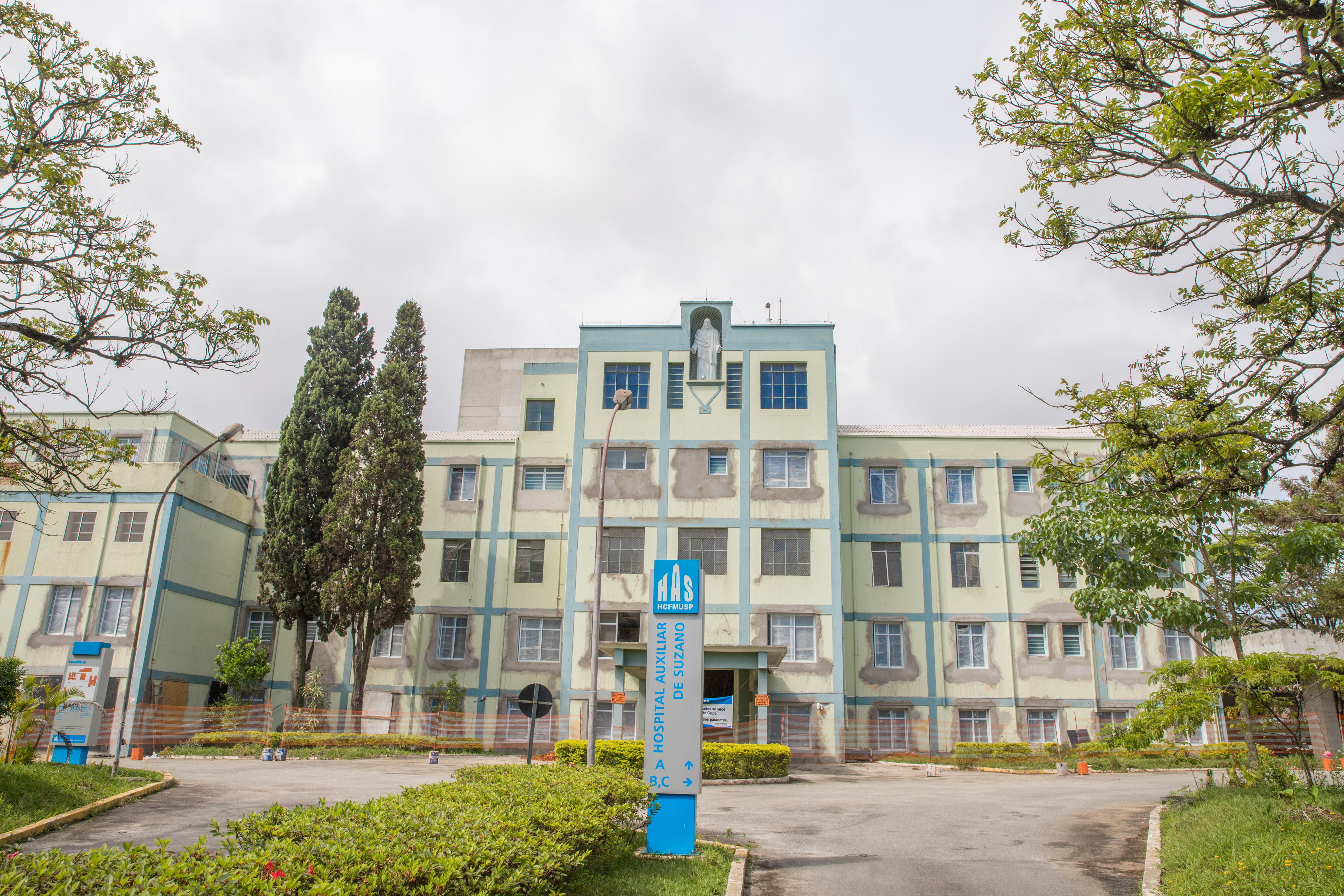 O governador Márcio França, realiza visita ao Hospital das Clínicas de Suzano. Local: Suzano/SP Data: 20/10/2018. Foto: Governo do Estado de São Paulo